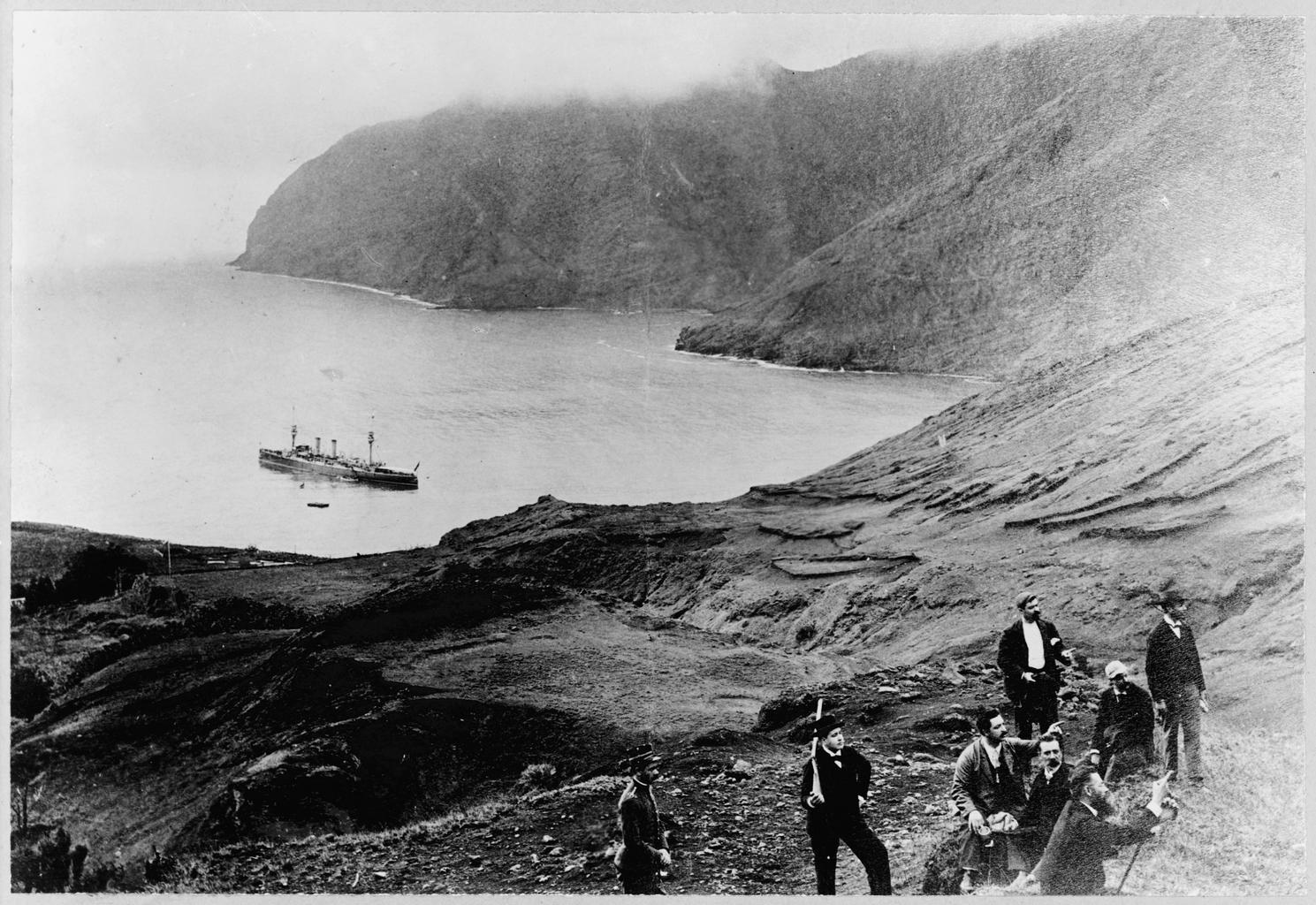 Imagen de la isla Robinson Crusoe de la colección de Frank y Frances Carpenter. La foto fue tomada en algún momento entre 1890 y 1922.